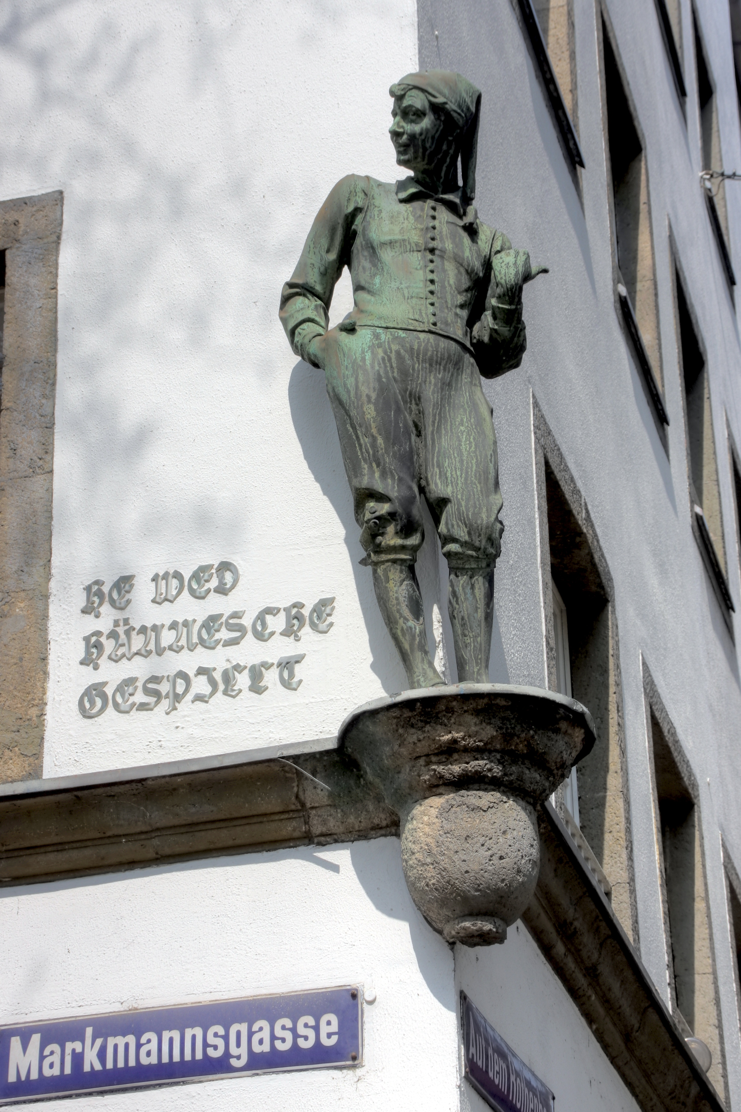 Figur am Haus Ecke Markmannsgasse/Auf dem Rothenberg in Köln, die auf das Hänneschen-Theater hinweist. Schrift an der Wand: He wed Hännesche gespillt